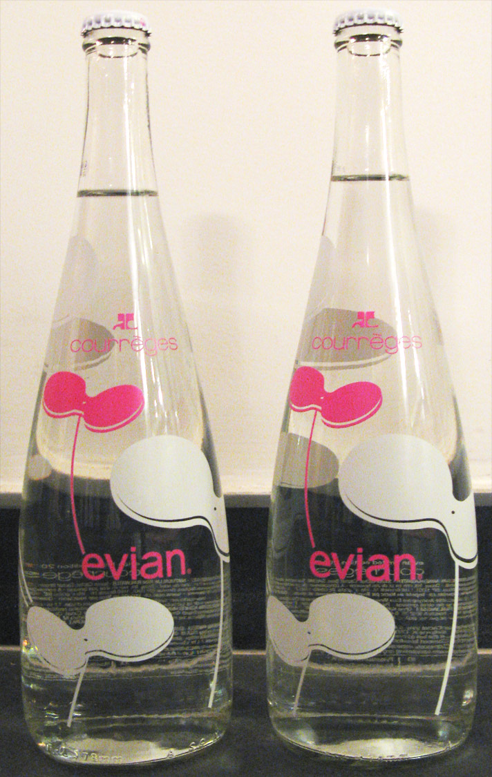 Bouteilles d'eau EVIAN en verre, année 2011, collection Courrèges